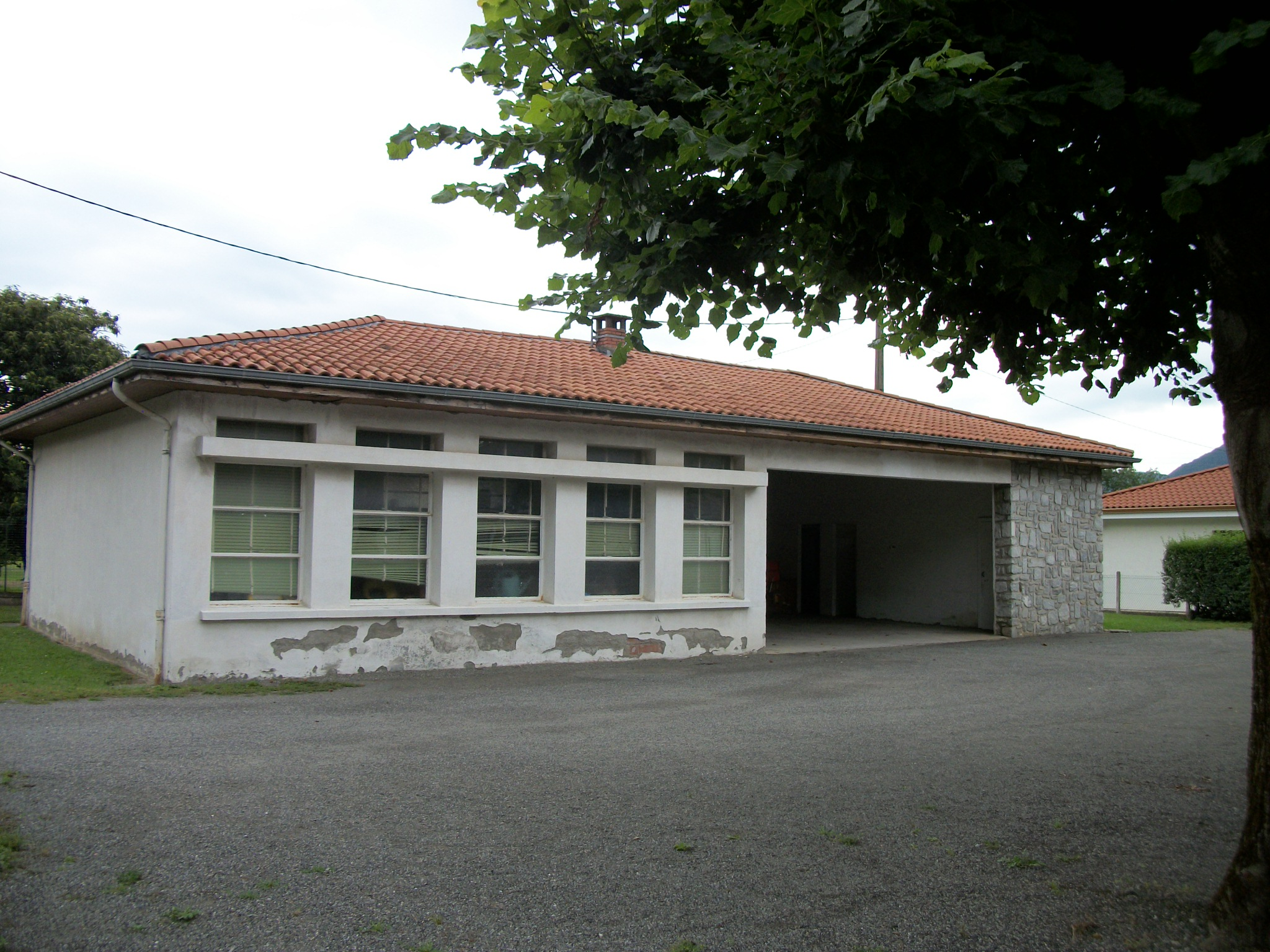 Esténos